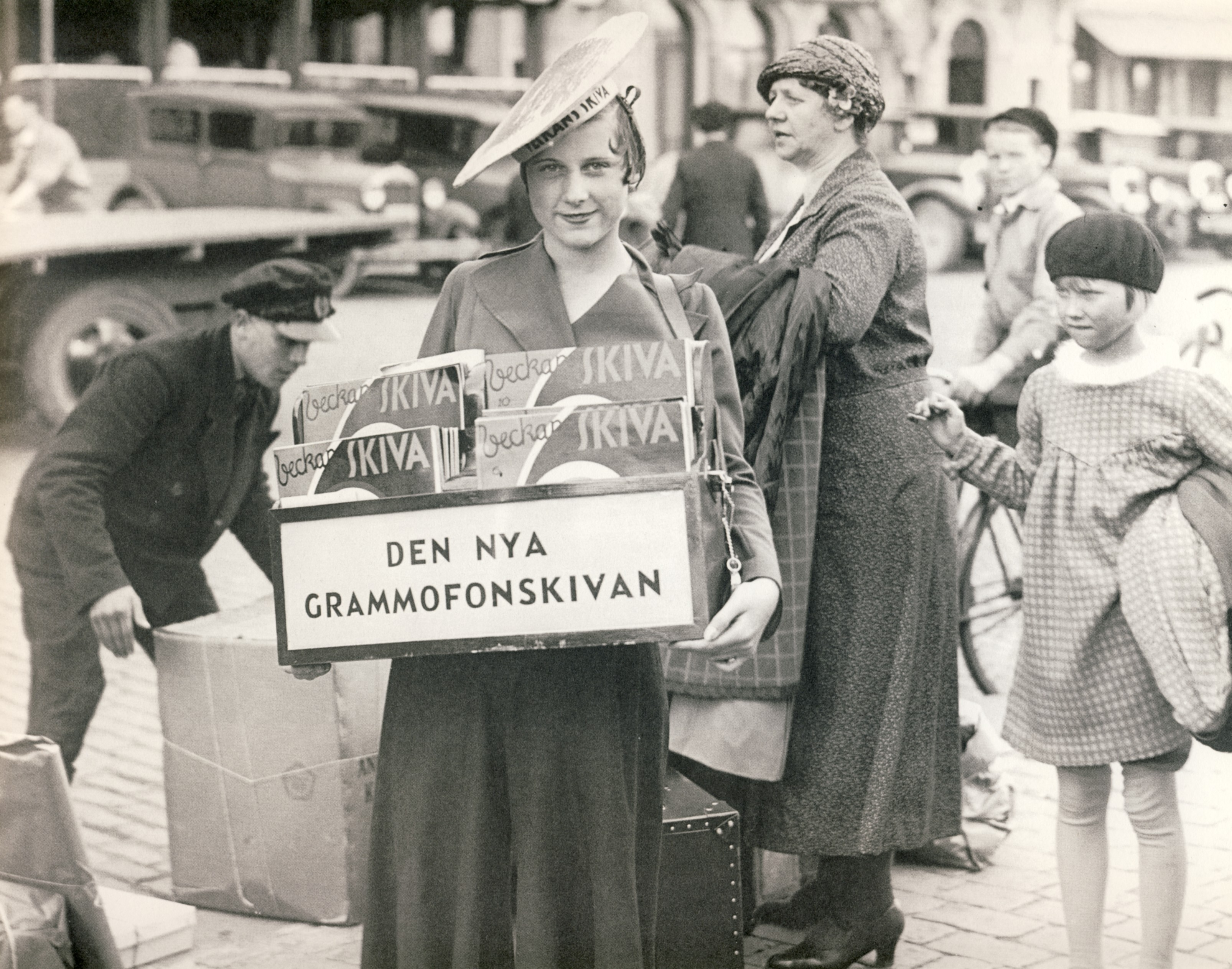 "Veckans skiva" säljes från en låda på magen på Södra Blasieholmskajen utanför Grand Hotel i Stockholm